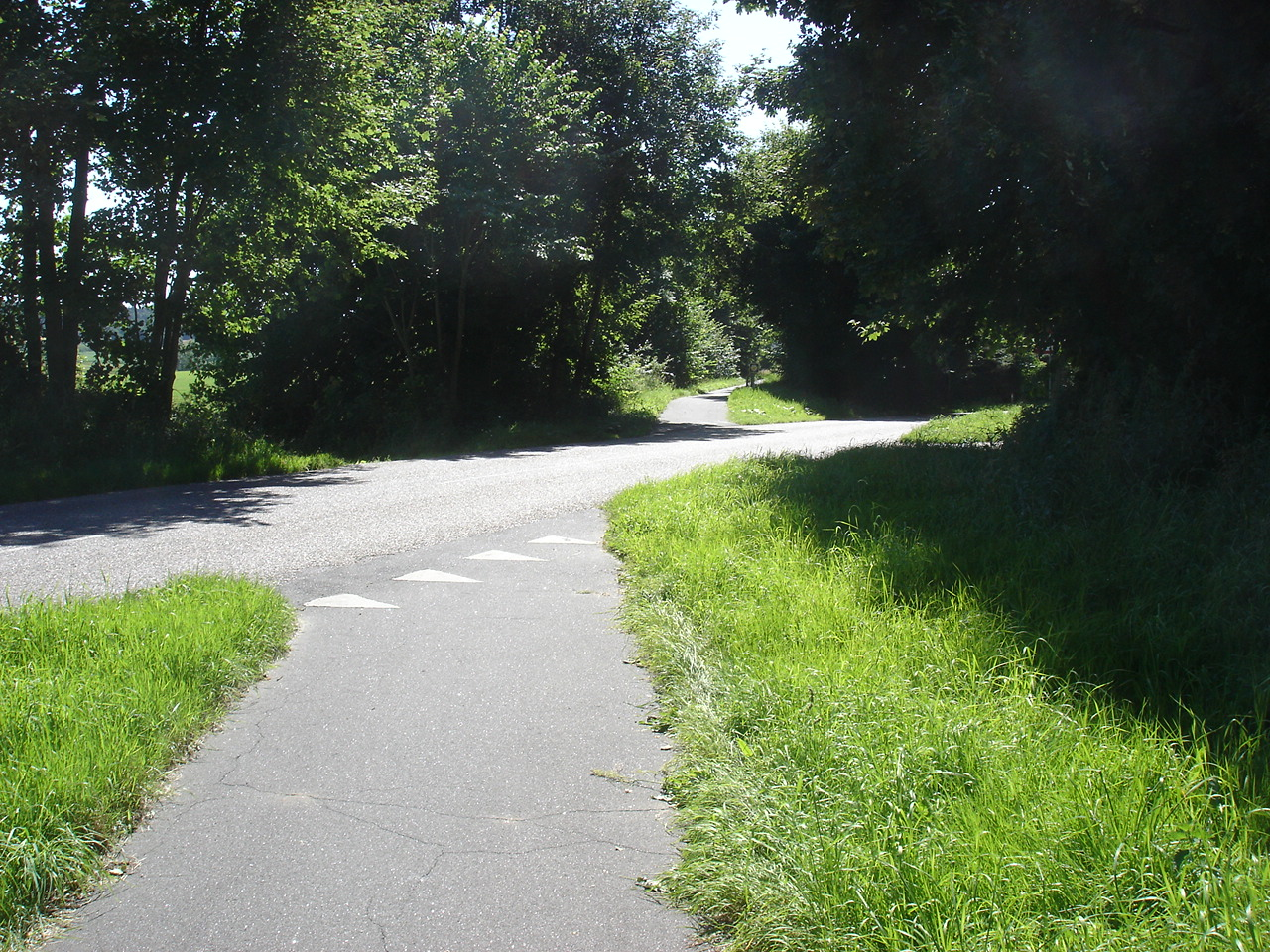 Nørreåstien krydser Østervangsvej - her lå Viskum trinbræt